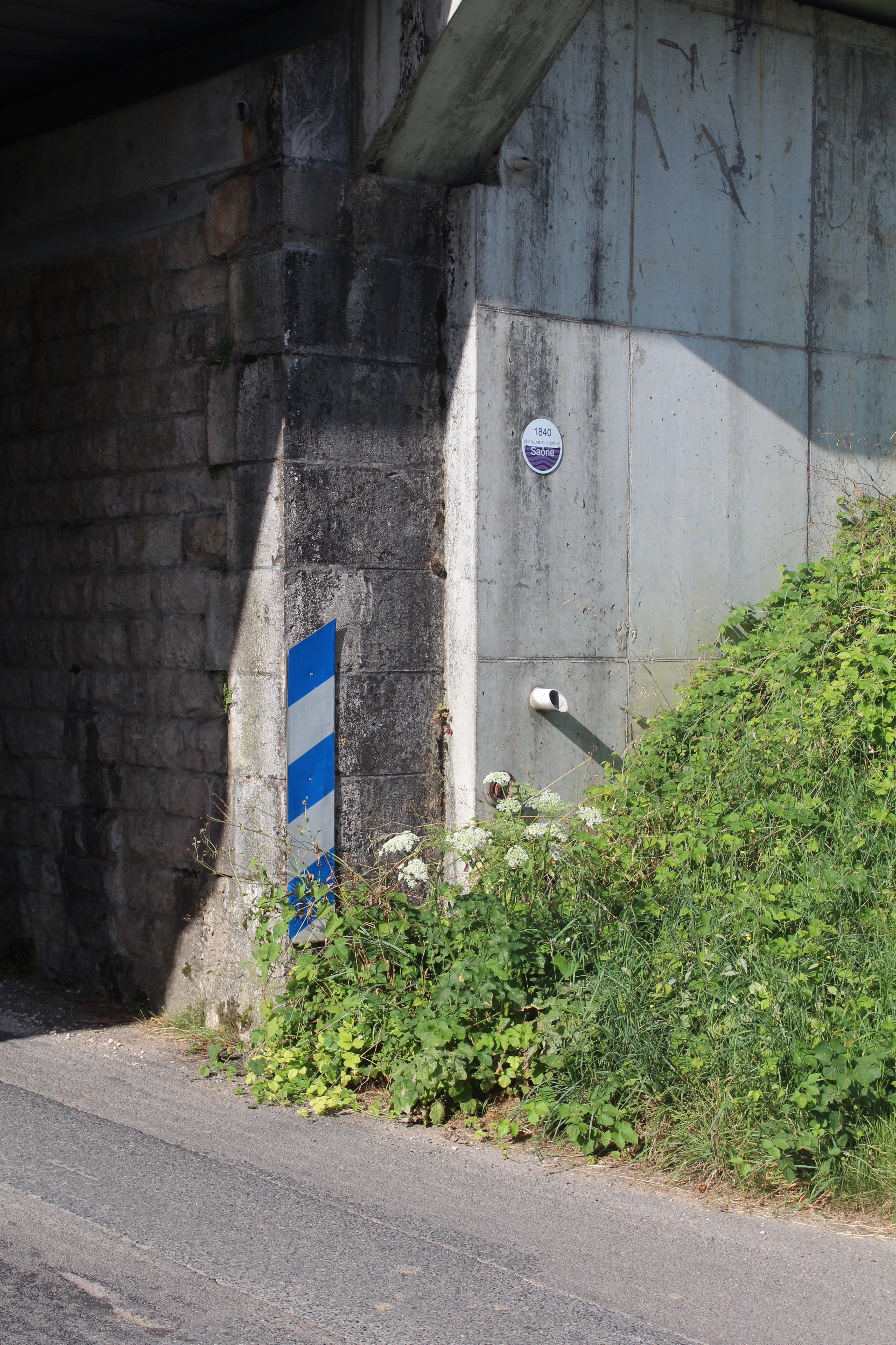 Indication sur le niveau de la crue de 1840 au hameau de Chavannes à Crottet.